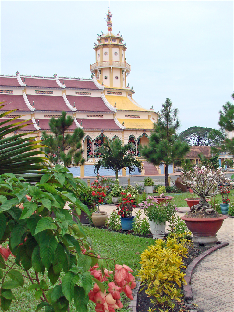 Jardin du grand temple de la Sainte Mère à Tay Ninh, au Vietnam Le Cao Daï (Palais Suprême) est une religion, fondée en 1926 et reconnue officiellement au Vietnam dont le Saint Siège est à Tay Ninh à une centaine de kilomètres d'Ho Chi Minh Ville (ancienne Saïgon) Le grand temple, appelé Thanh That Cao Dai, a été construit entre 1933 et 1955, sans plan préalable et selon les visions du fondateur de cette religion : Ngô Van Chieu. Son architecture très colorée opère une fusion entre l'Occident et l'Orient. Il est entouré d'un grand jardin. site officiel Photo Annie Dalbéra